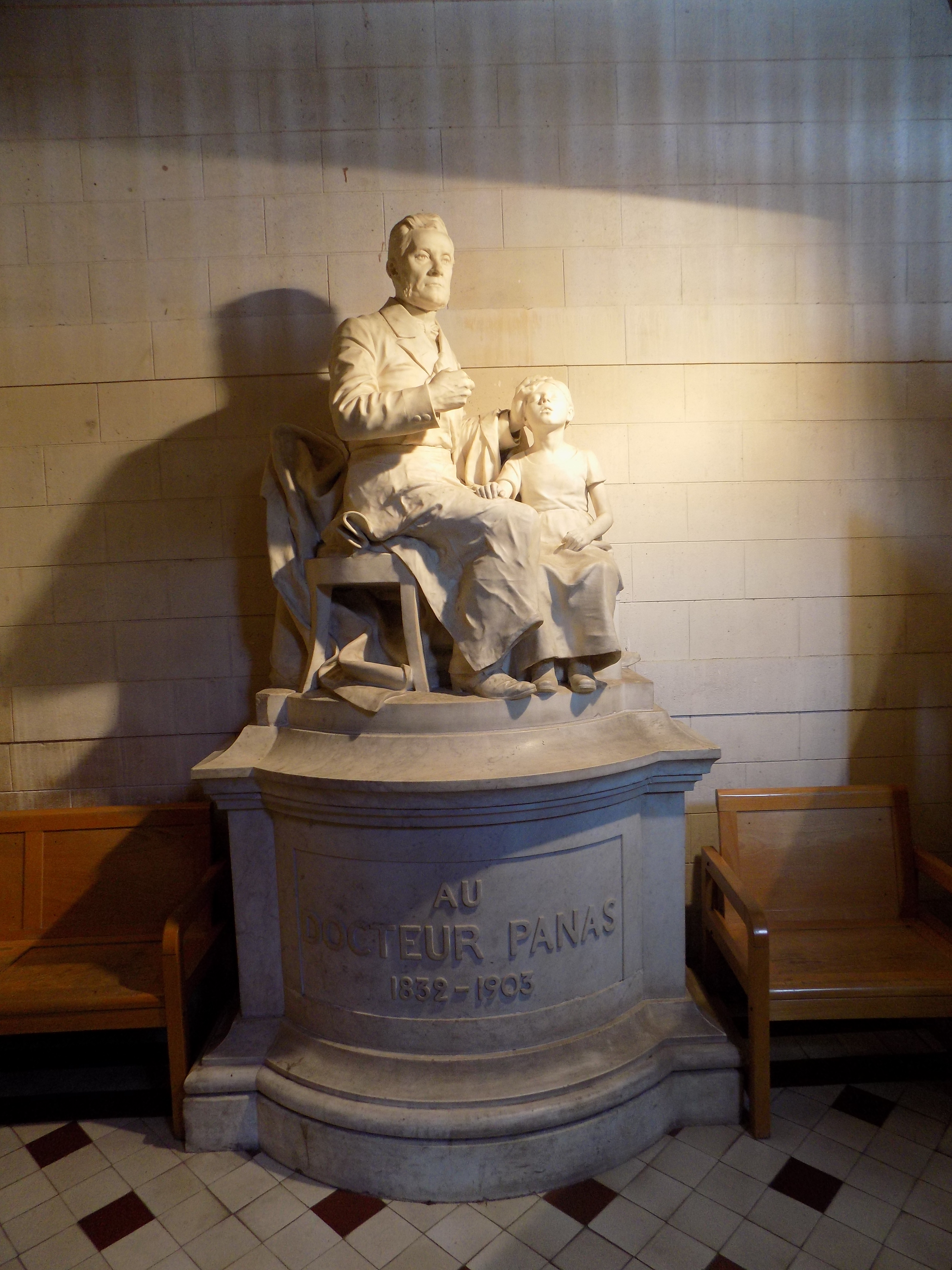 Φωτογραφία αδριάντα του Φωτεινού Πανά από τον γλύπτη Alfred Boucher, στο Παρίσι. Επιγραφή: AU DOCTEUR PANAS 1832-1903